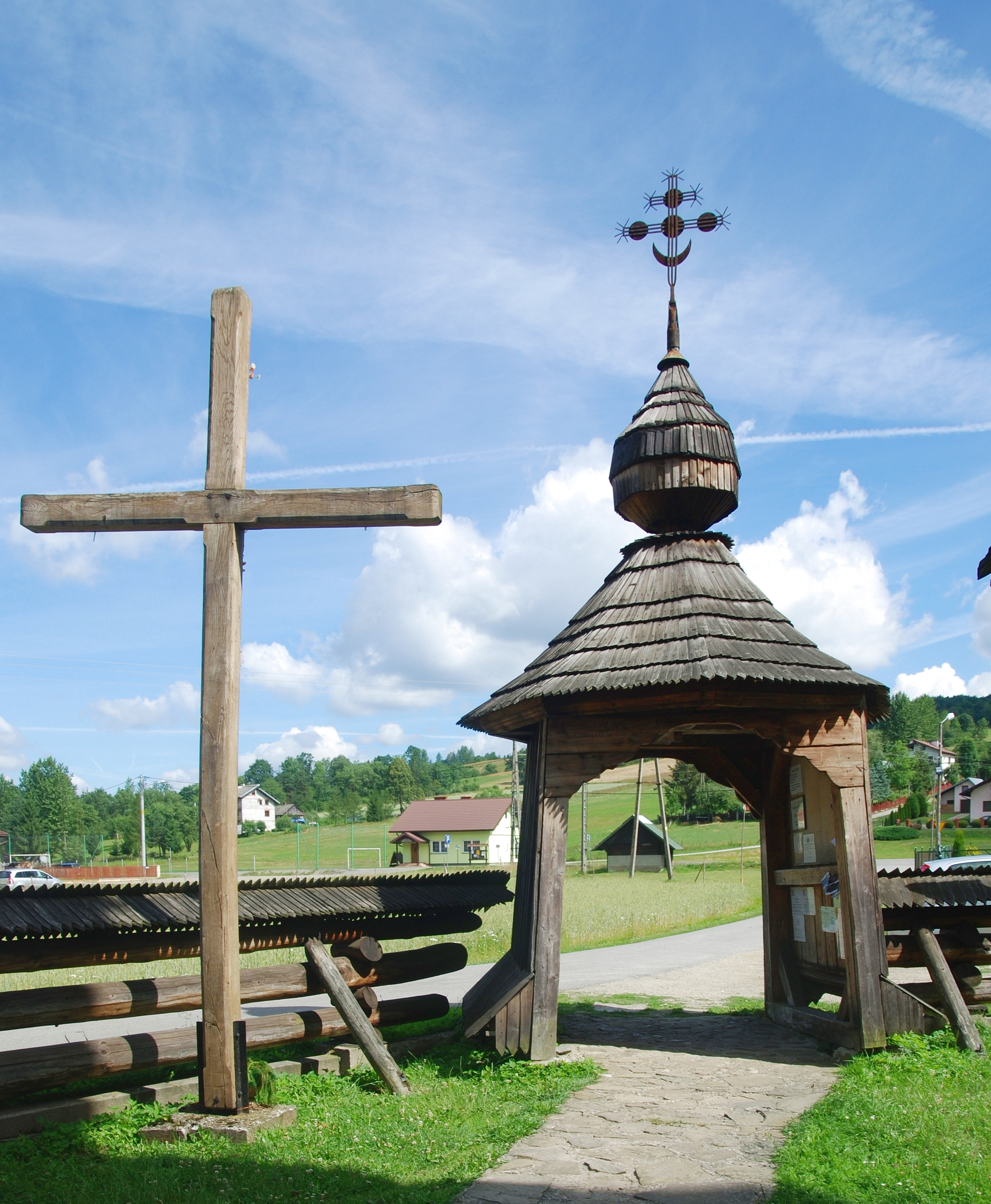 wieś Kwiatoń